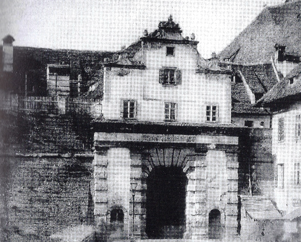 Äußeres Eisernes Tor. Ehemaliges Grazer Stadttor des Renaissance-Befestigungsgürtels vom Festungsbaumeister Domenico dell’Allio. Bestandszeit: 1571/74 – 1859/60.